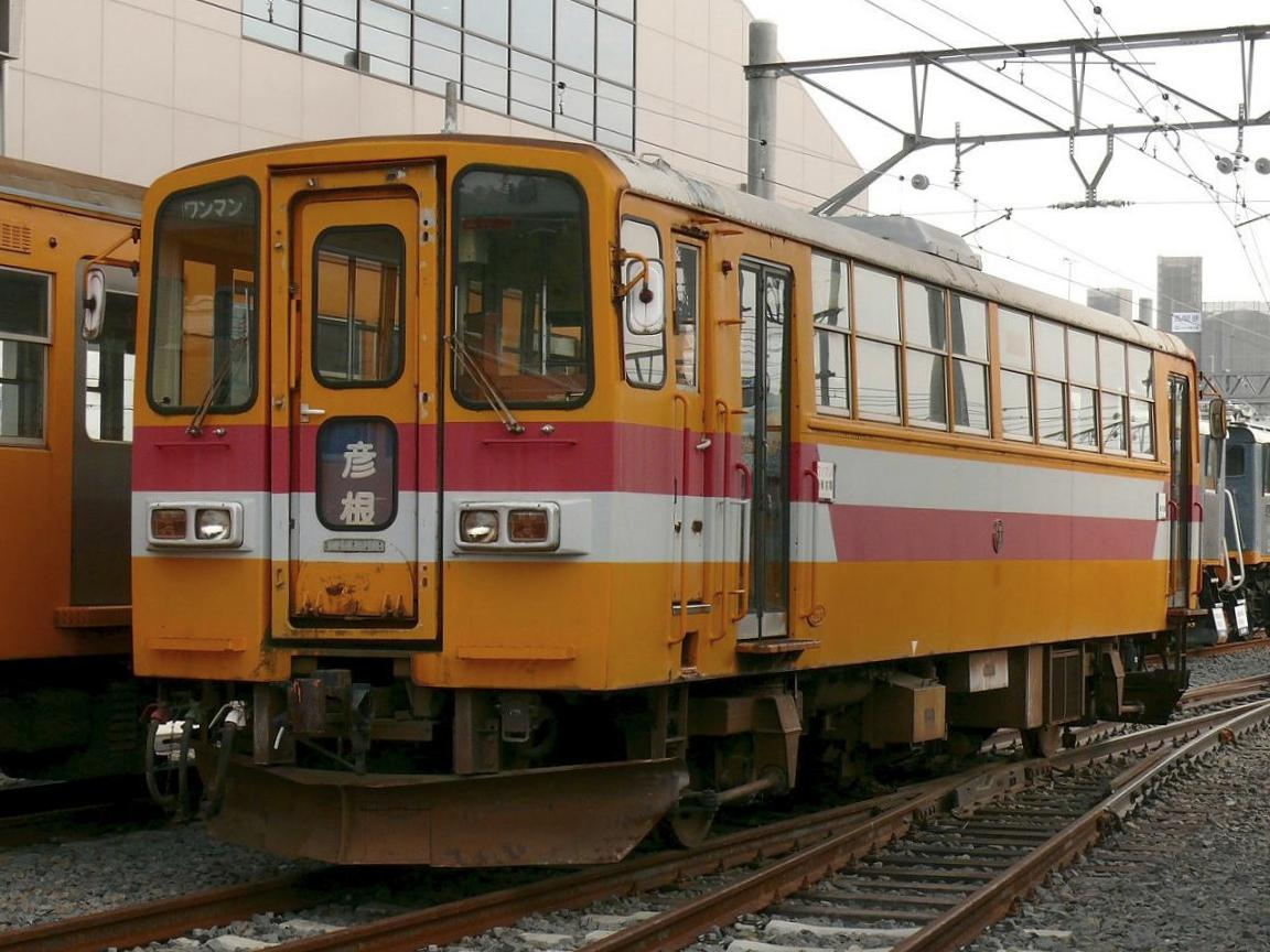 近江鉄道LE10形気動車（13）の米原側。 近江鉄道彦根駅構内の近江鉄道ミュージアム会場内にて撮影。